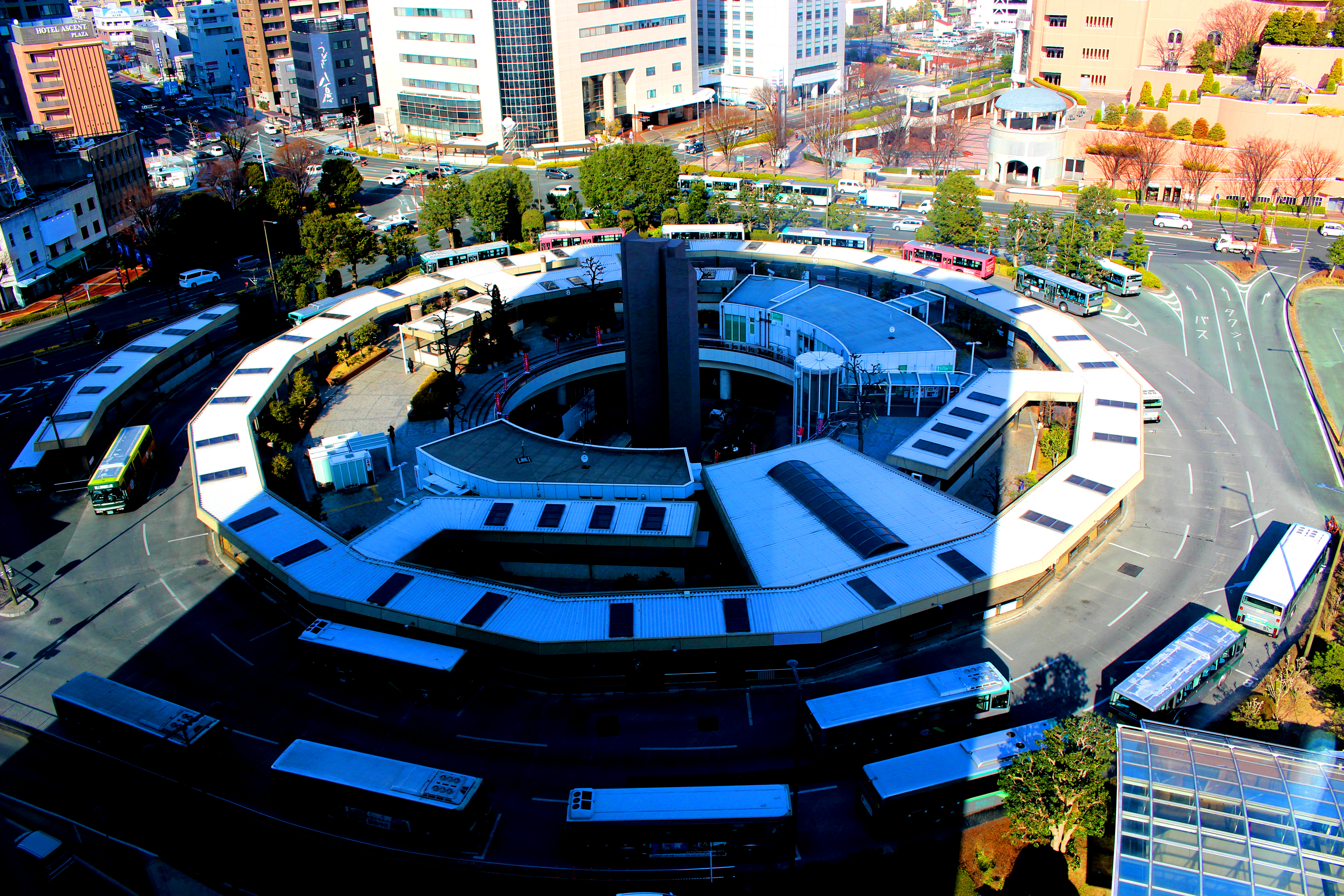 浜松駅バスターミナルの全景